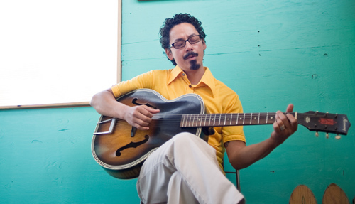 Tommy Guerrero HP Tommy Guerrero twitter